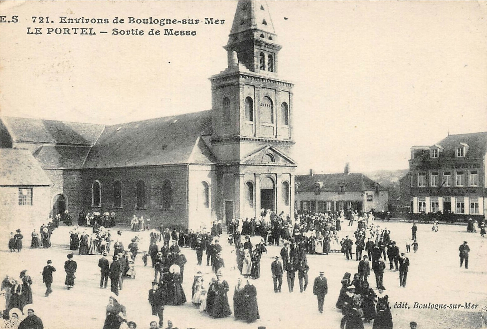 Sortie de messe au Portel vers 1900.